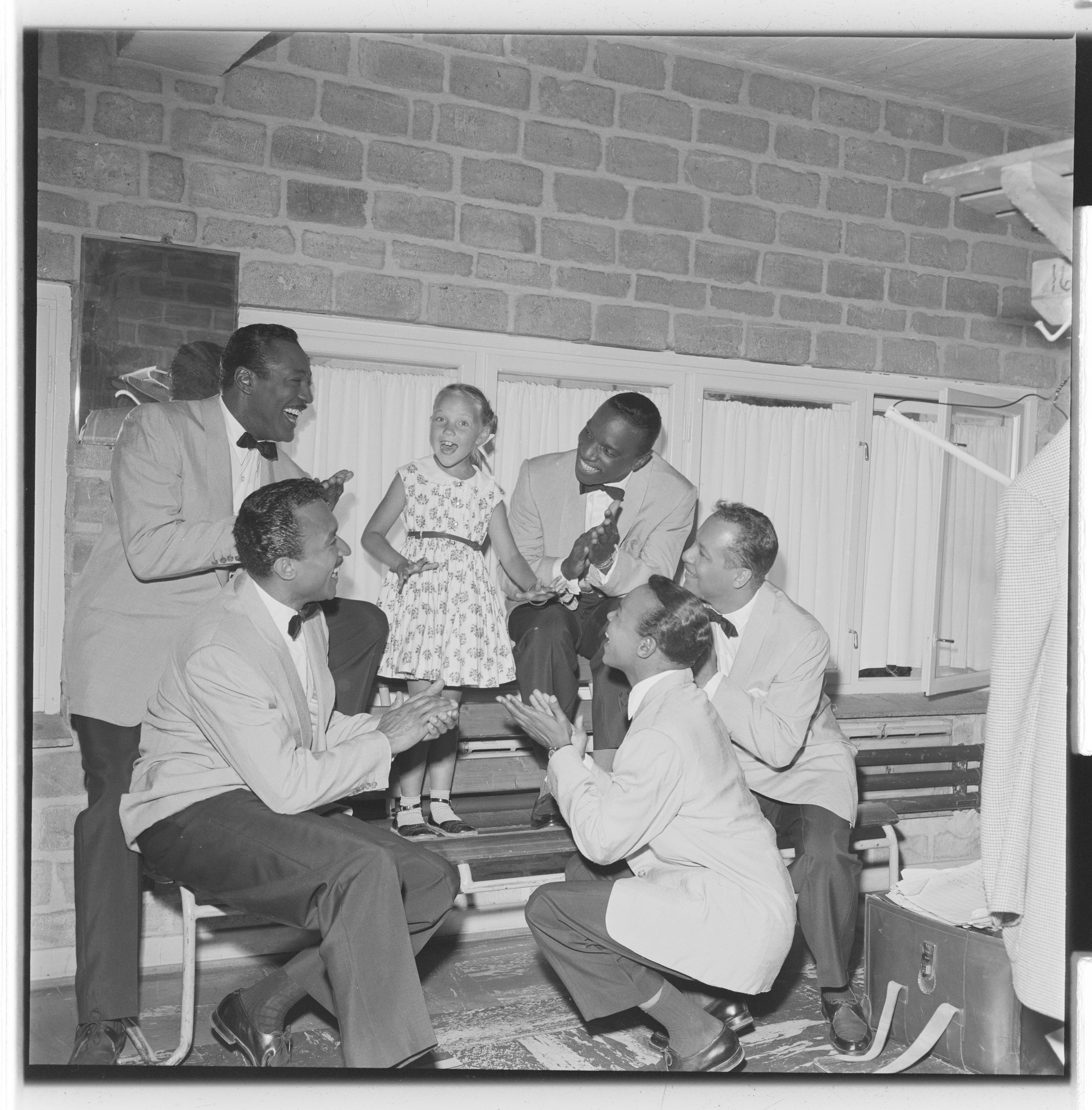 Bildet er hentet fra Arkivverket. Delta Rythm Boys på Jordal Amfi Arkivinstitusjon : Riksarkivet Arkivnavn : Billedbladet NÅ Sted : Norge, Oslo, Oslo, Jordal Amfi Emneord: konsert, musikere Avbildet: Delta Rythm Boys;Kausland, Grete